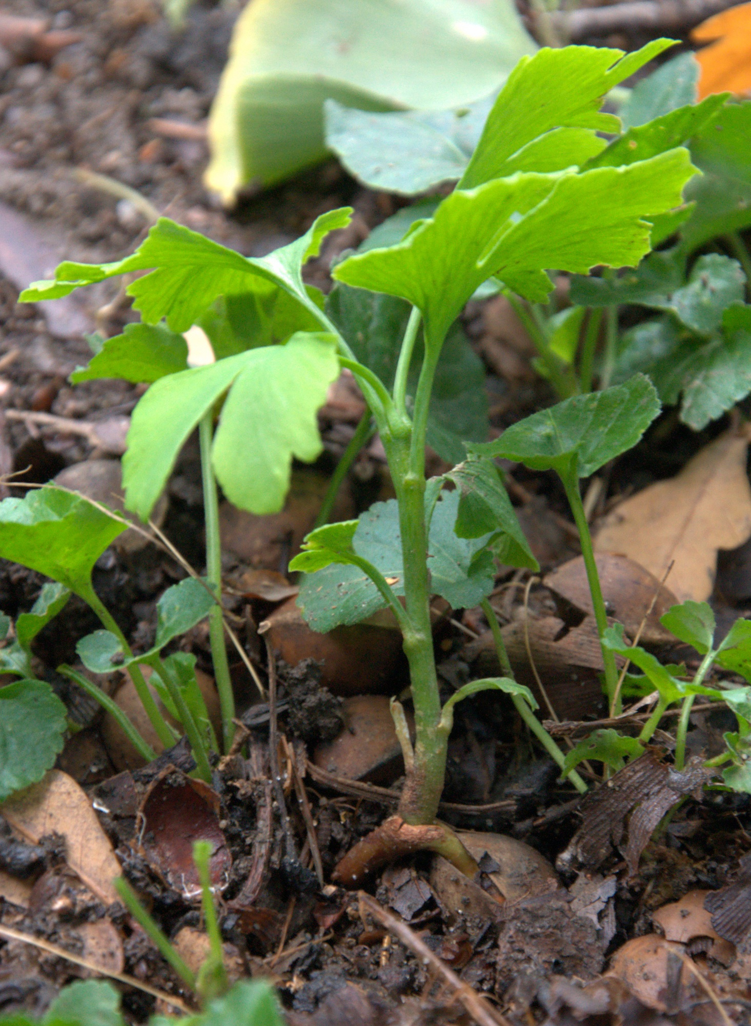 Miłorząb dwuklapowy (samosiew w Parku Szczytnickim we Wrocławiu). Ginkgo biloba seedling.